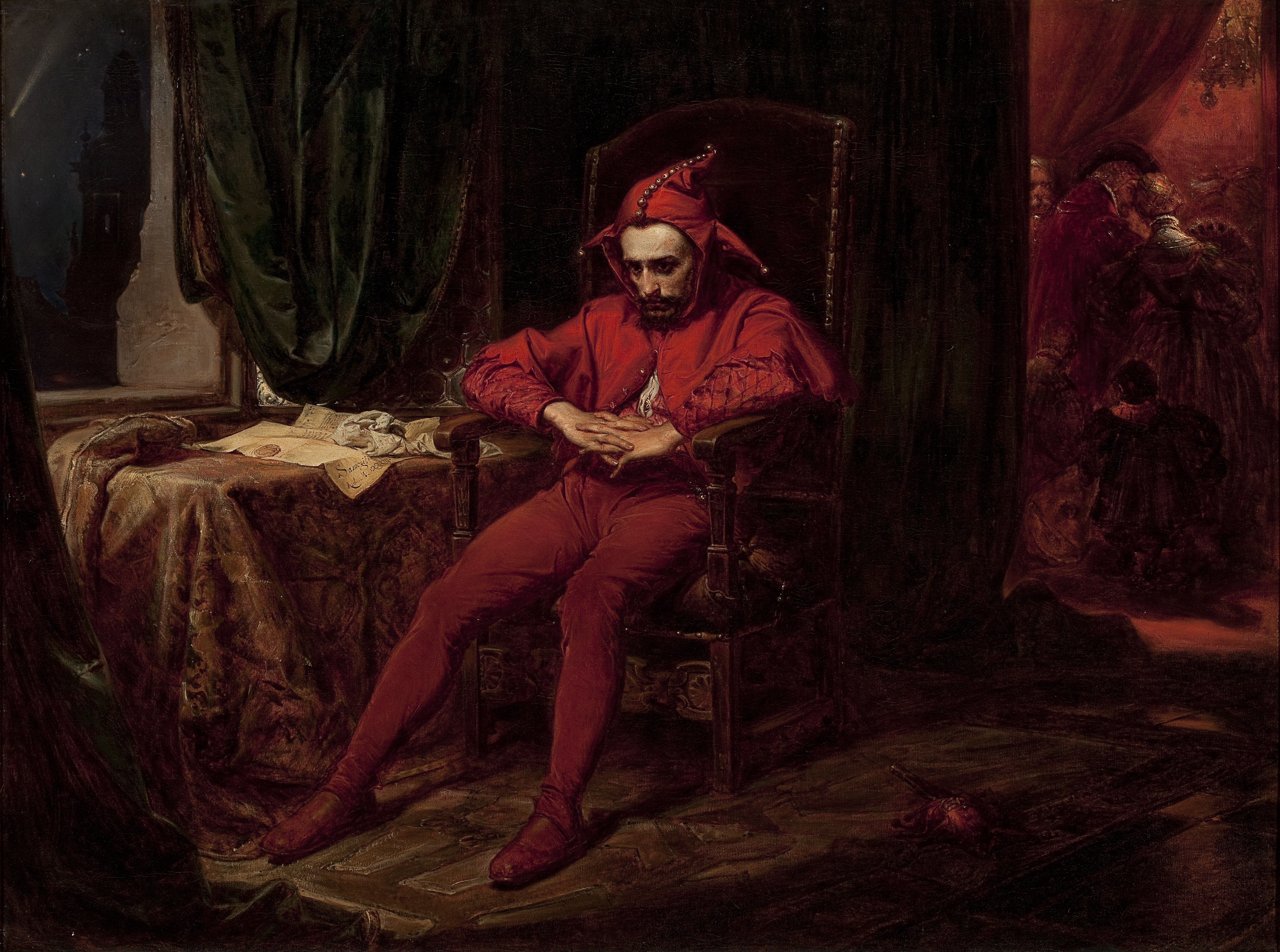 Stańczyk (painting)